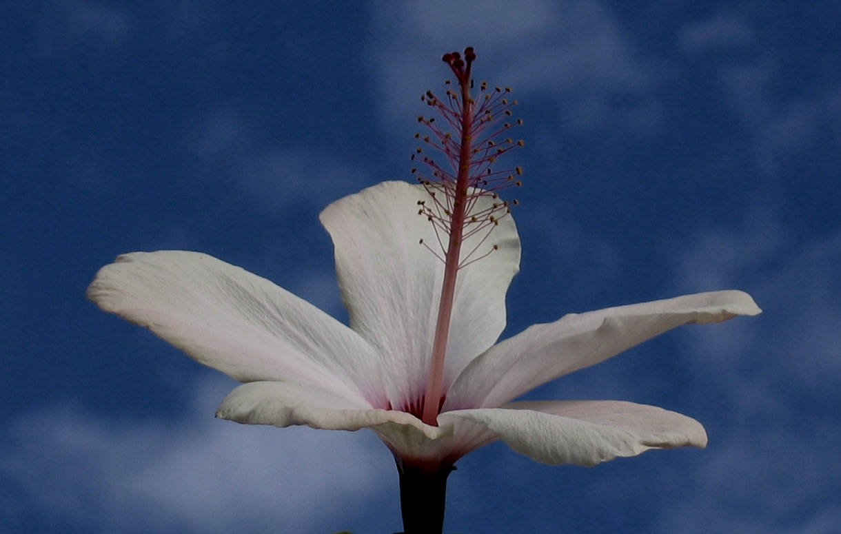 White Hibiscus